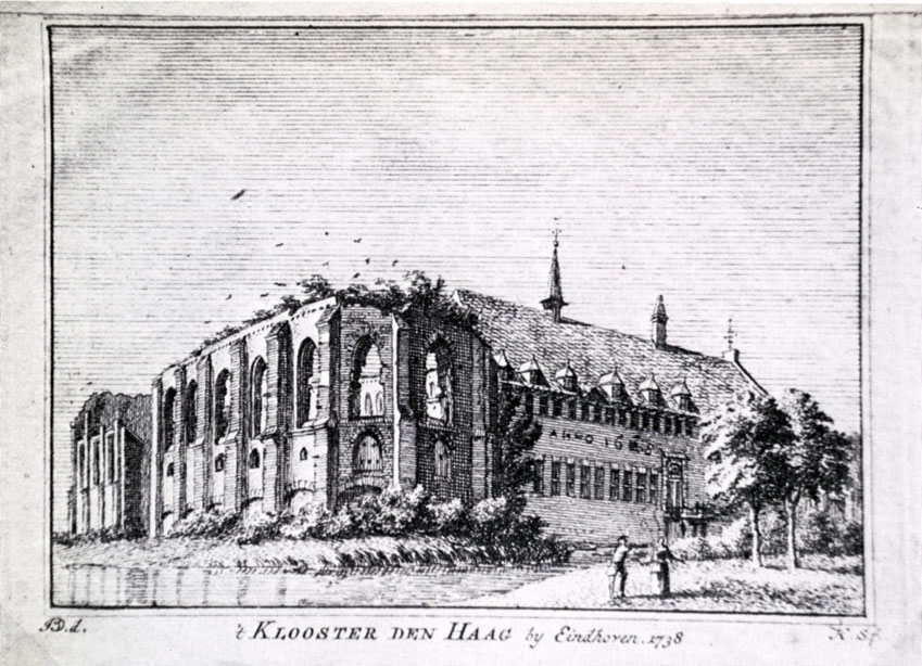 Picture of cloister Den Haag (Mariënhage)